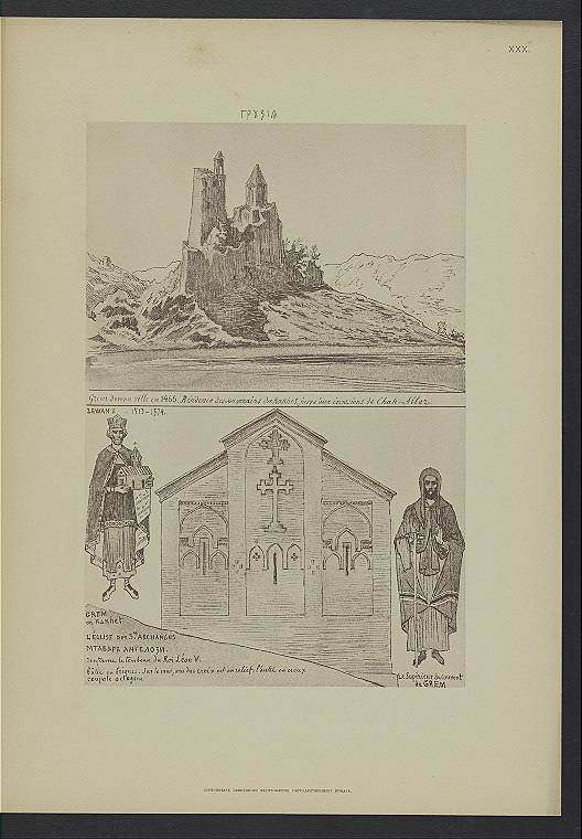 Image Title: Gruziia. Kakhetiia. Tserkov' Arkhangelov v Gremi Alternate Title: Georgia, Kakhetiia (Kaxeti). Church of the Archangels.